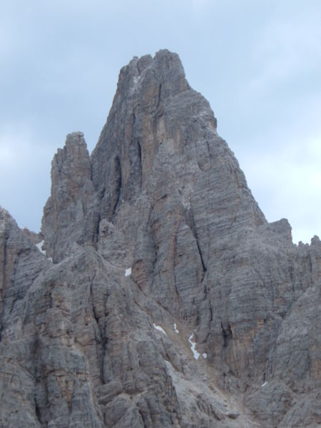 eigen werk